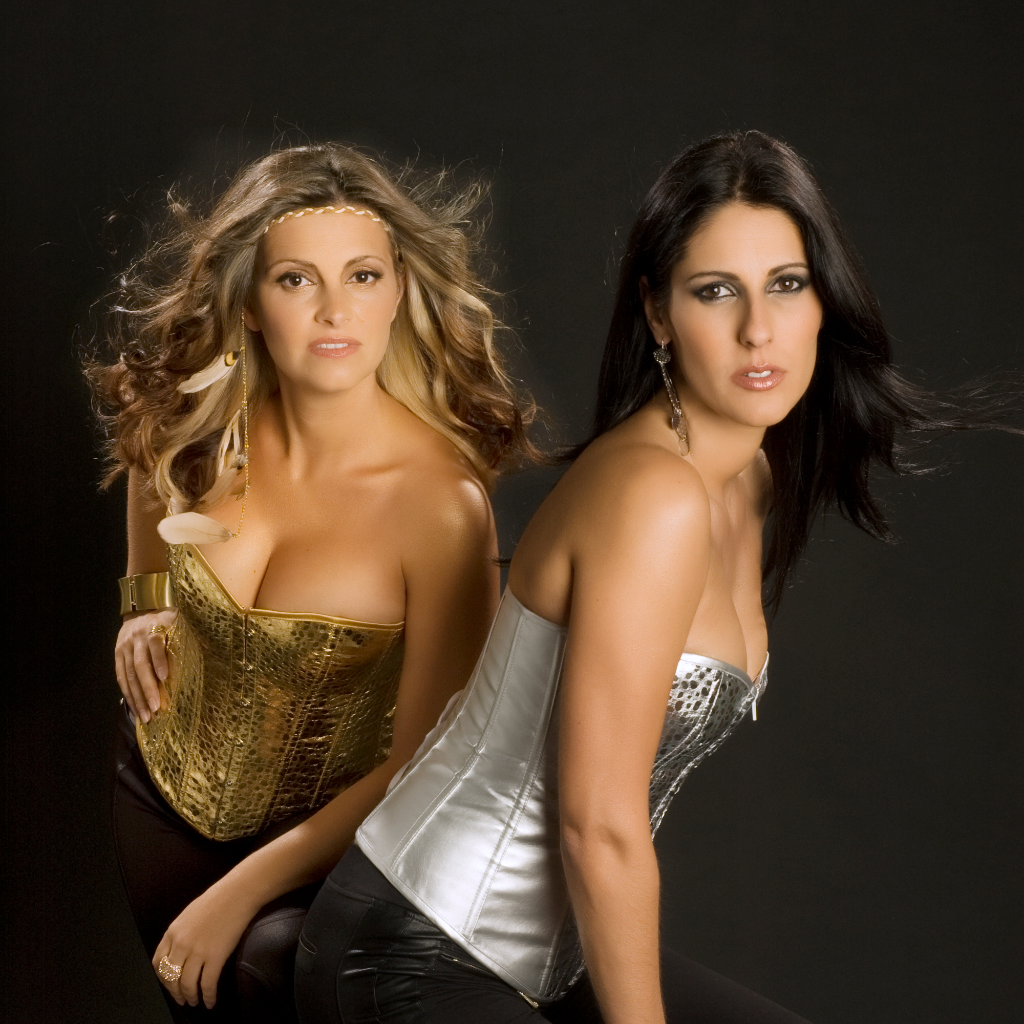 Artistas